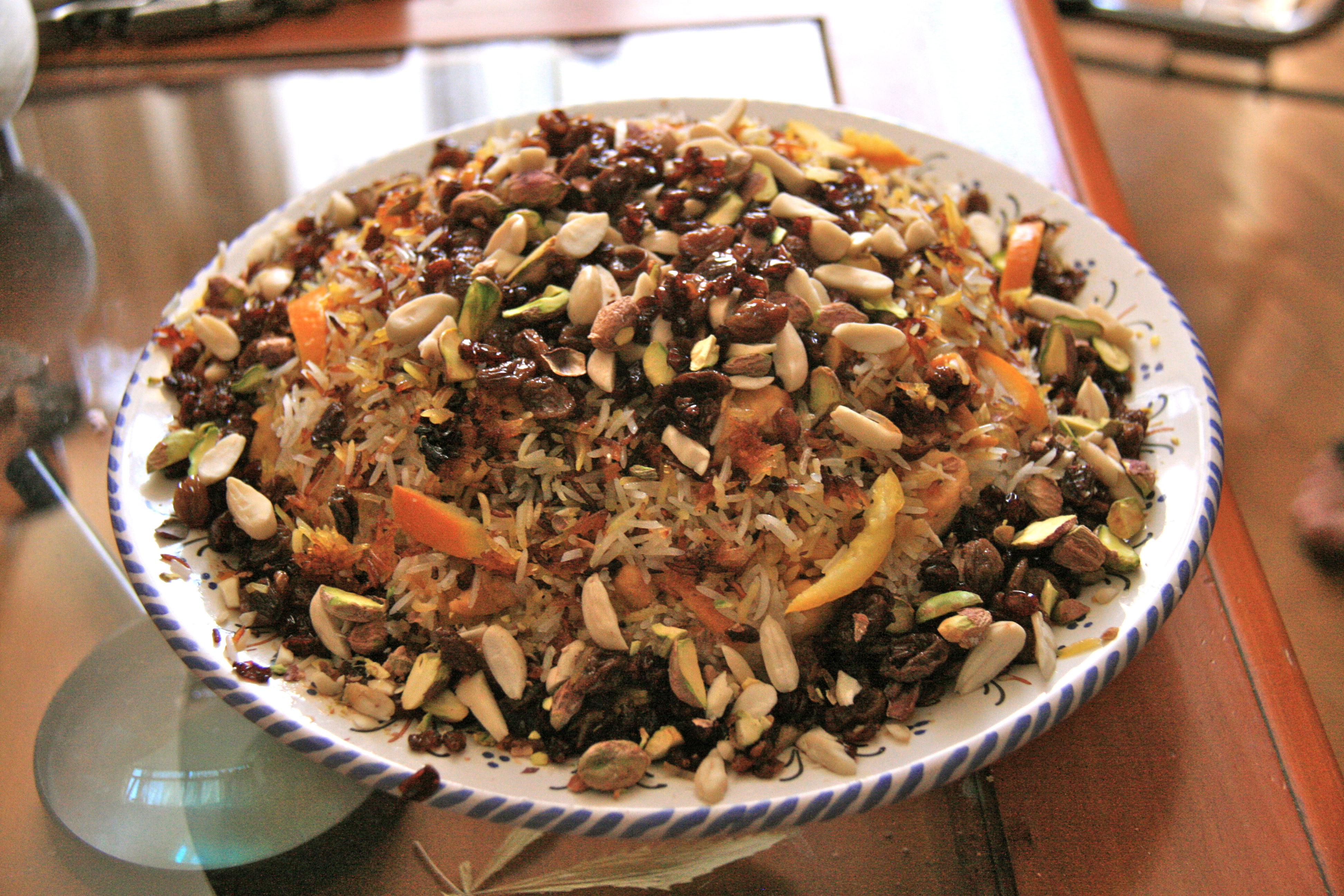 Arroz enjoyado